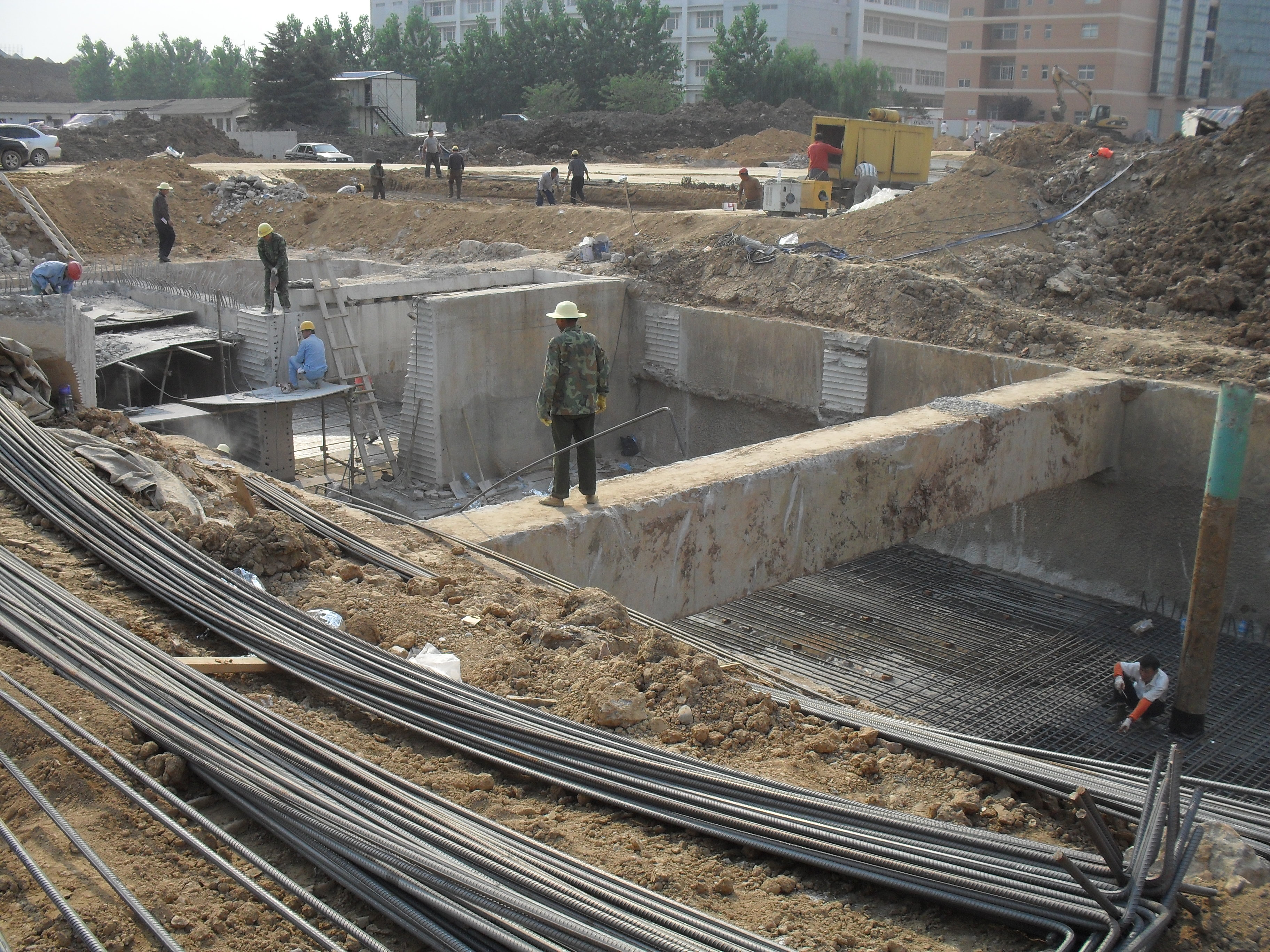 南京南站北广场建设中